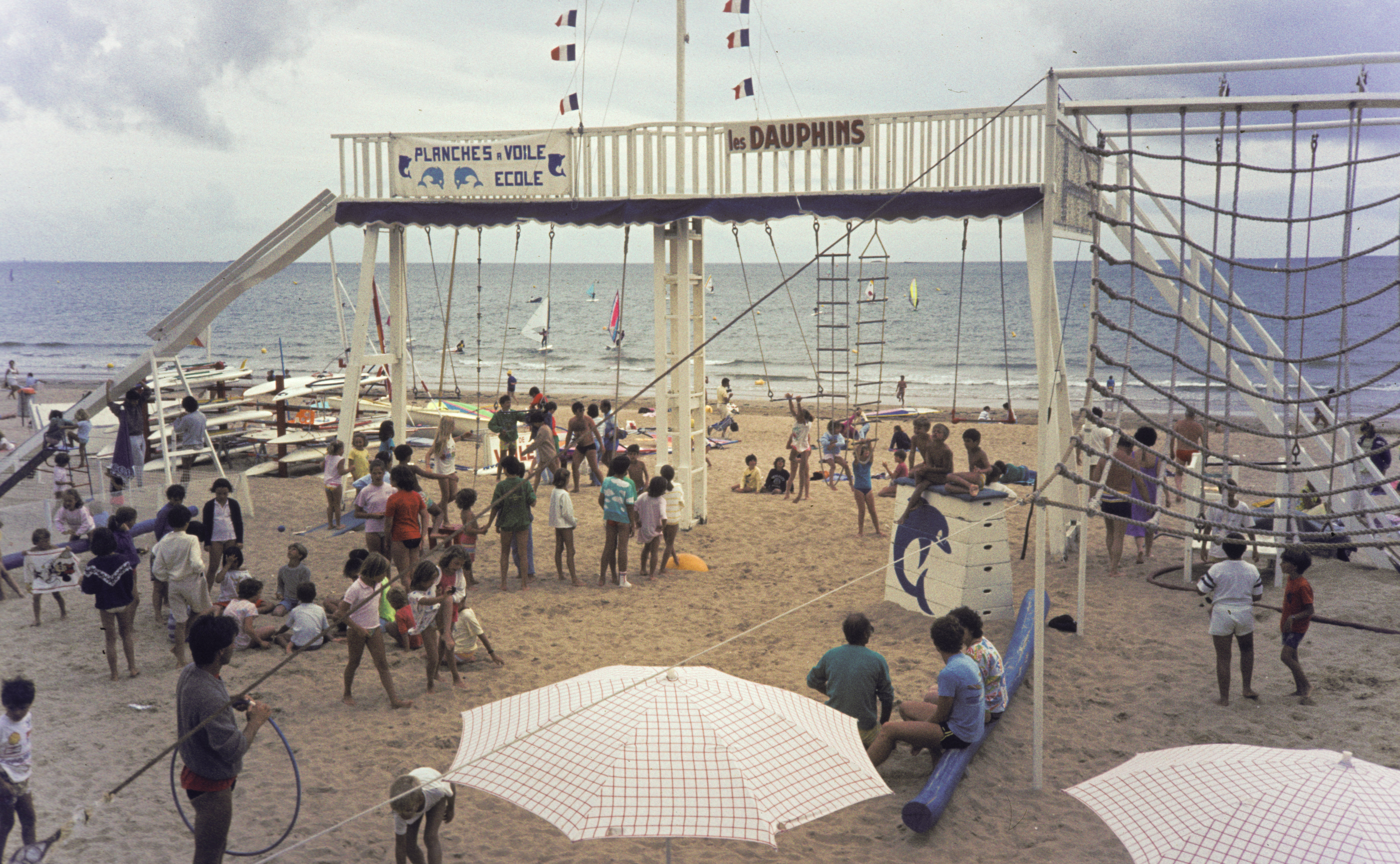 Plage de La Baule, Loire-Atlantique (France)